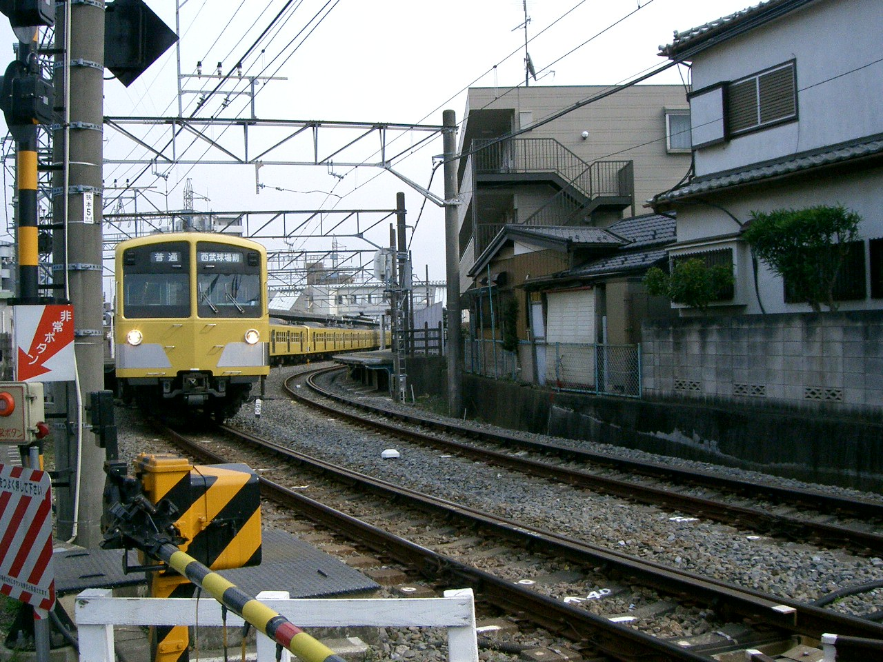 西所沢駅を出発する西武狭山線の電車